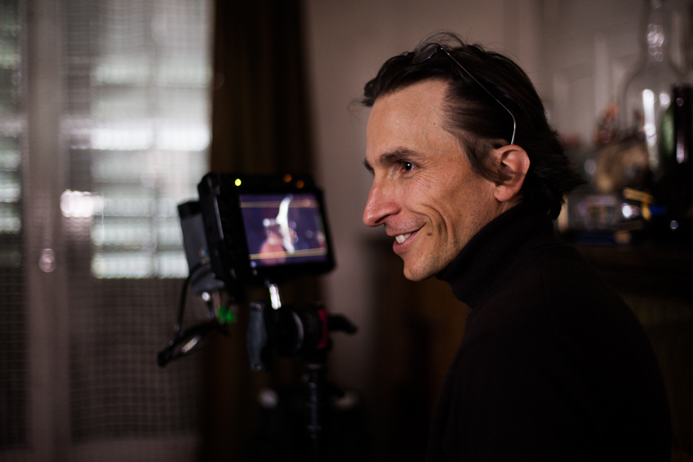 Stefan Jäger (Regisseur, Produzent) bei den Dreharbeiten des Schweizer Kinofilms DER GROSSE SOMMER